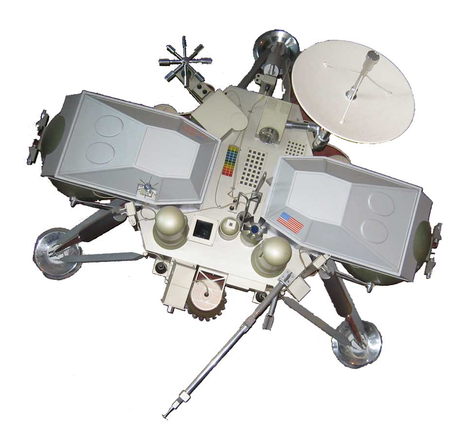 Description : Maquette sonde martienne américaine Viking Place : Musée des sciences et des techniques de la Villette, Paris, France Date : juillet 2006 Auteur : Pline photo personnelle